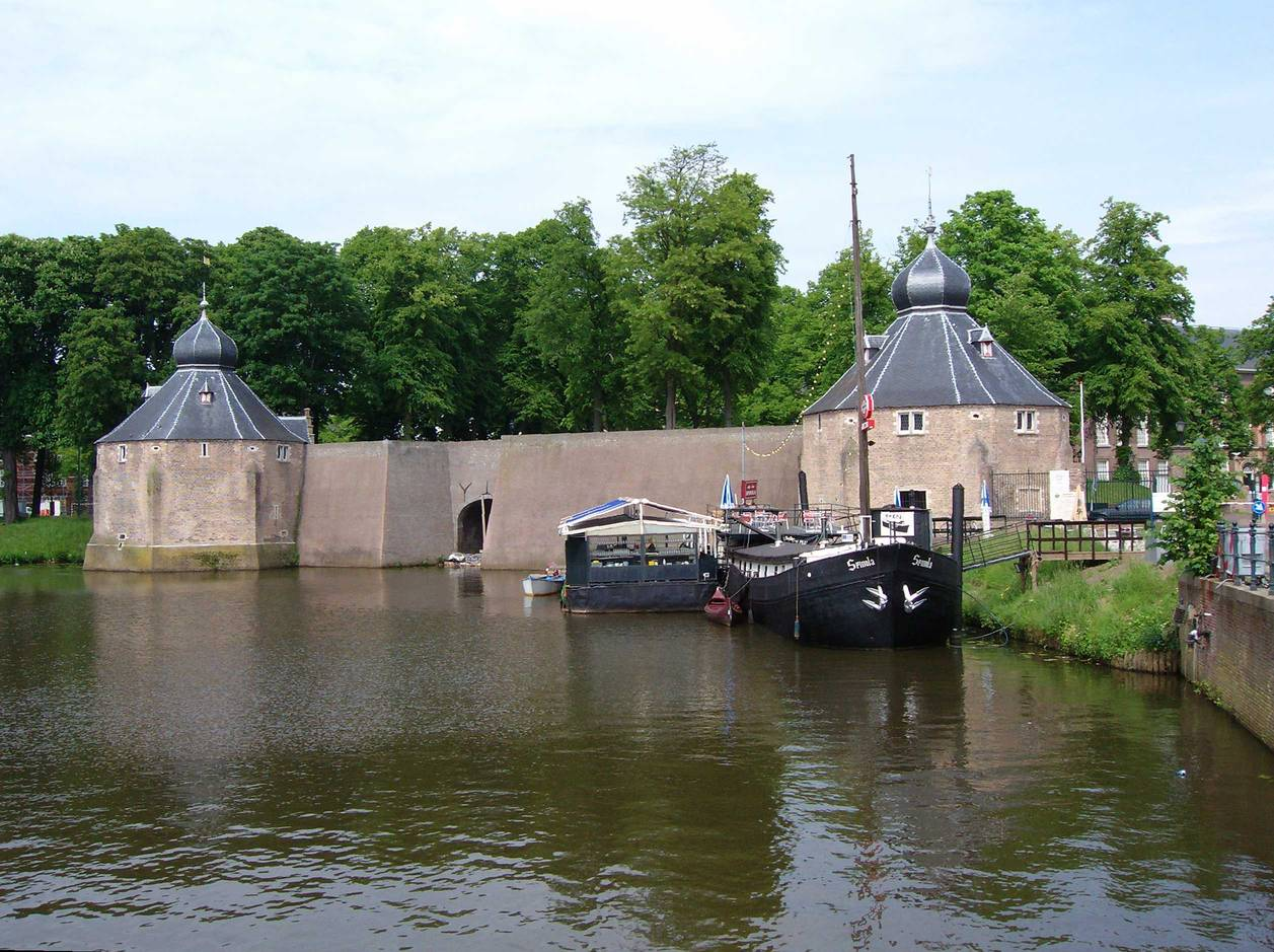 Spanjaardsgat, water gate in Breda, Netherlands